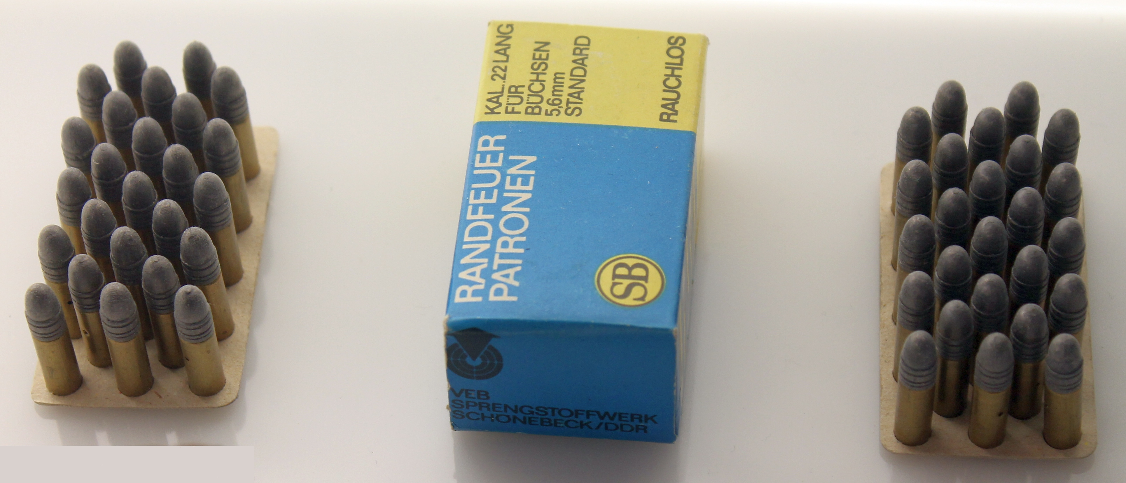 Kleinkaliberpatronen .22lfB (5,6 x 15,5 mm R) im Waffenmuseum Suhl. Packung mit 50 Stück, VEB Sprengstoffwerk Schönebeck/Elbe.